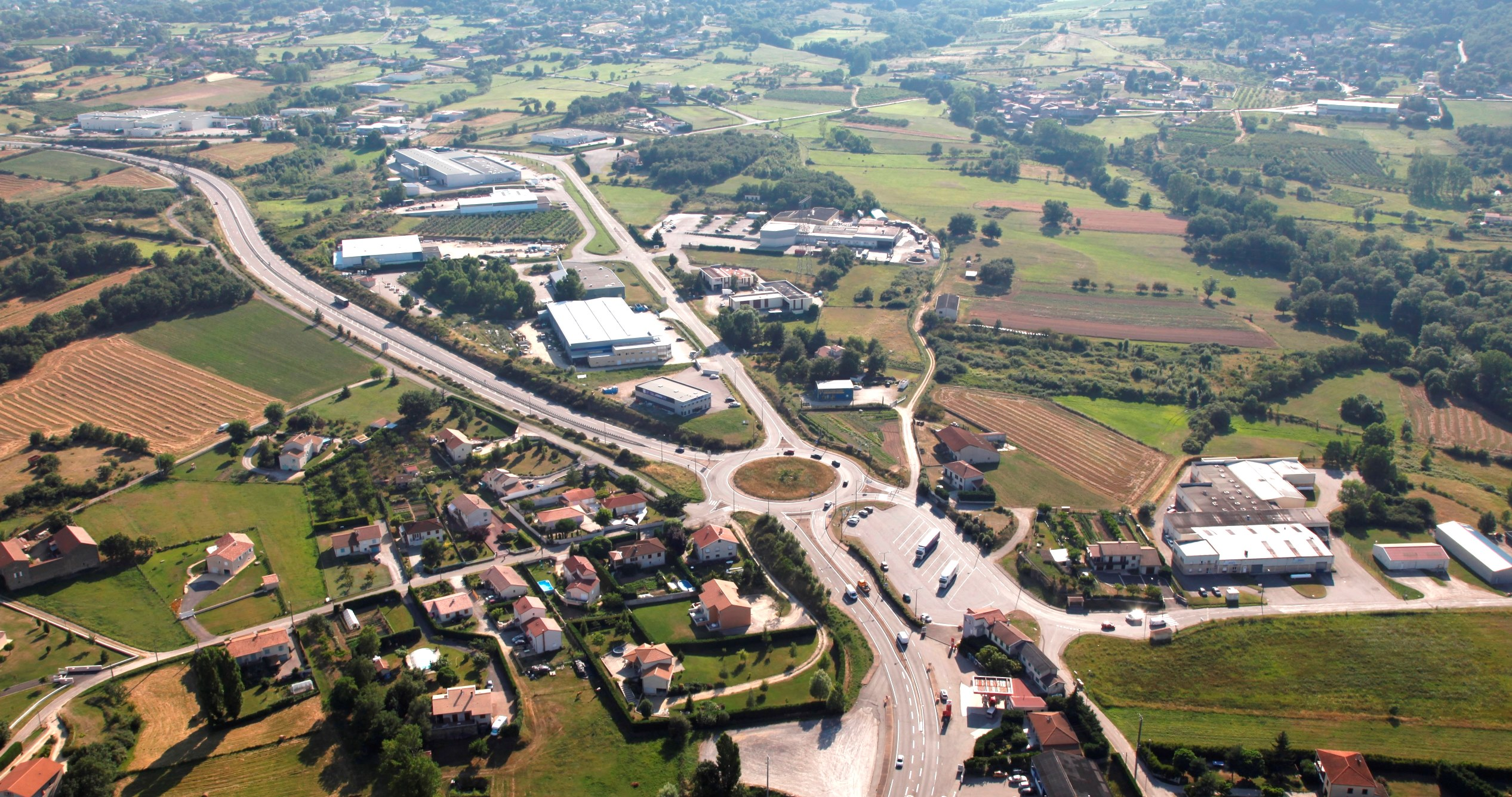 Félines détail